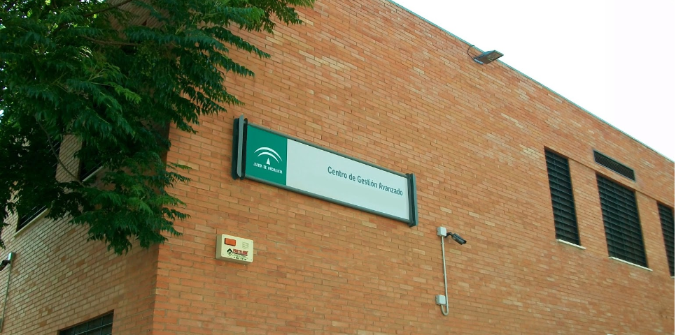 Sede del CGA